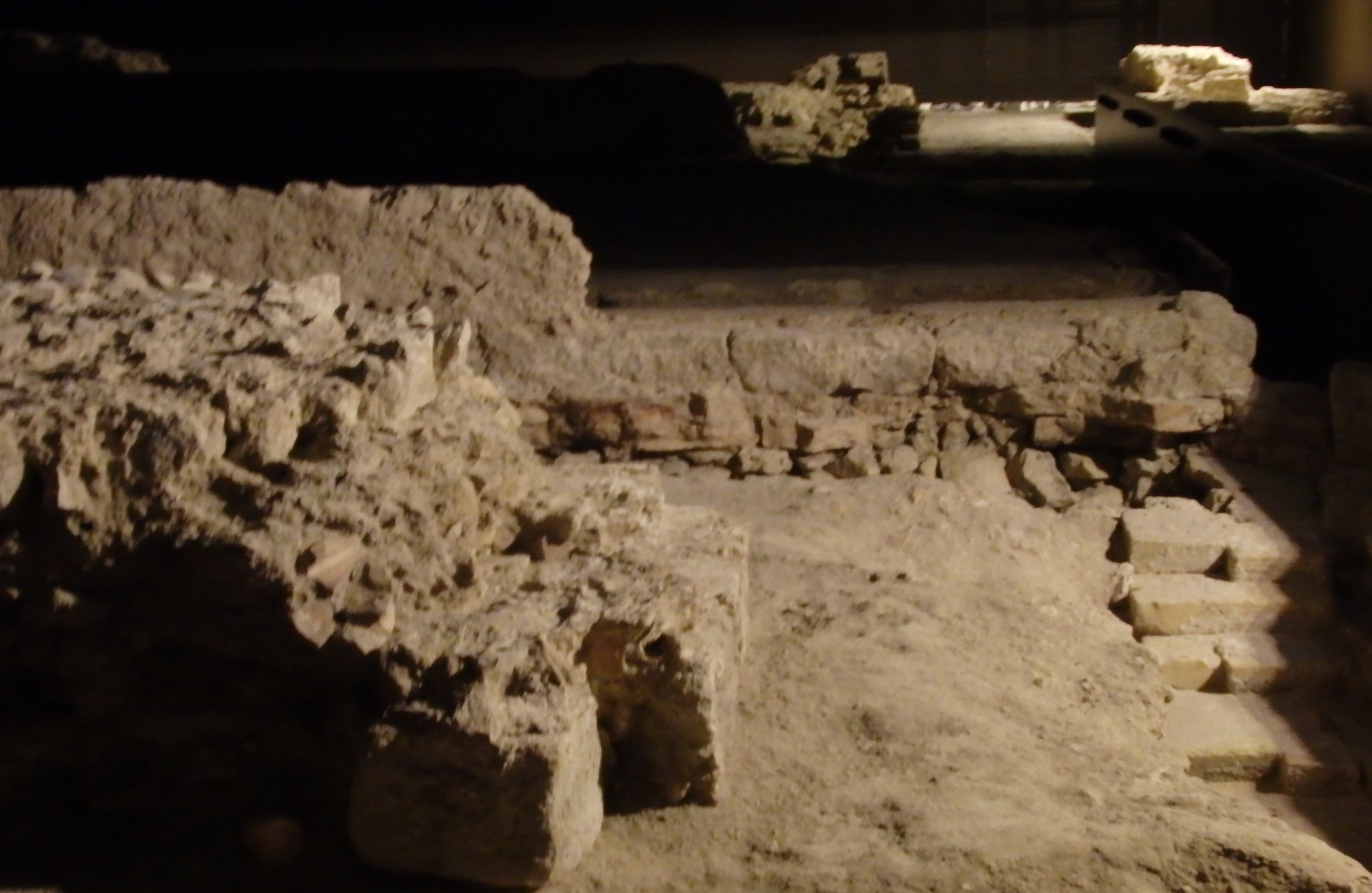 resti delle scale presenti nel lato destro dell'abside